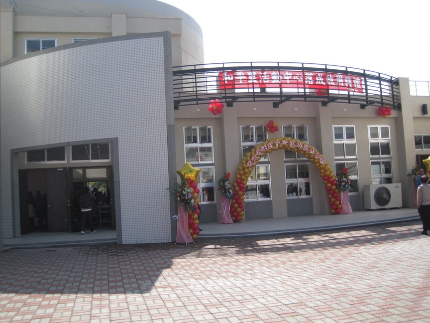 台南市和平里活動中心 (落成典禮)